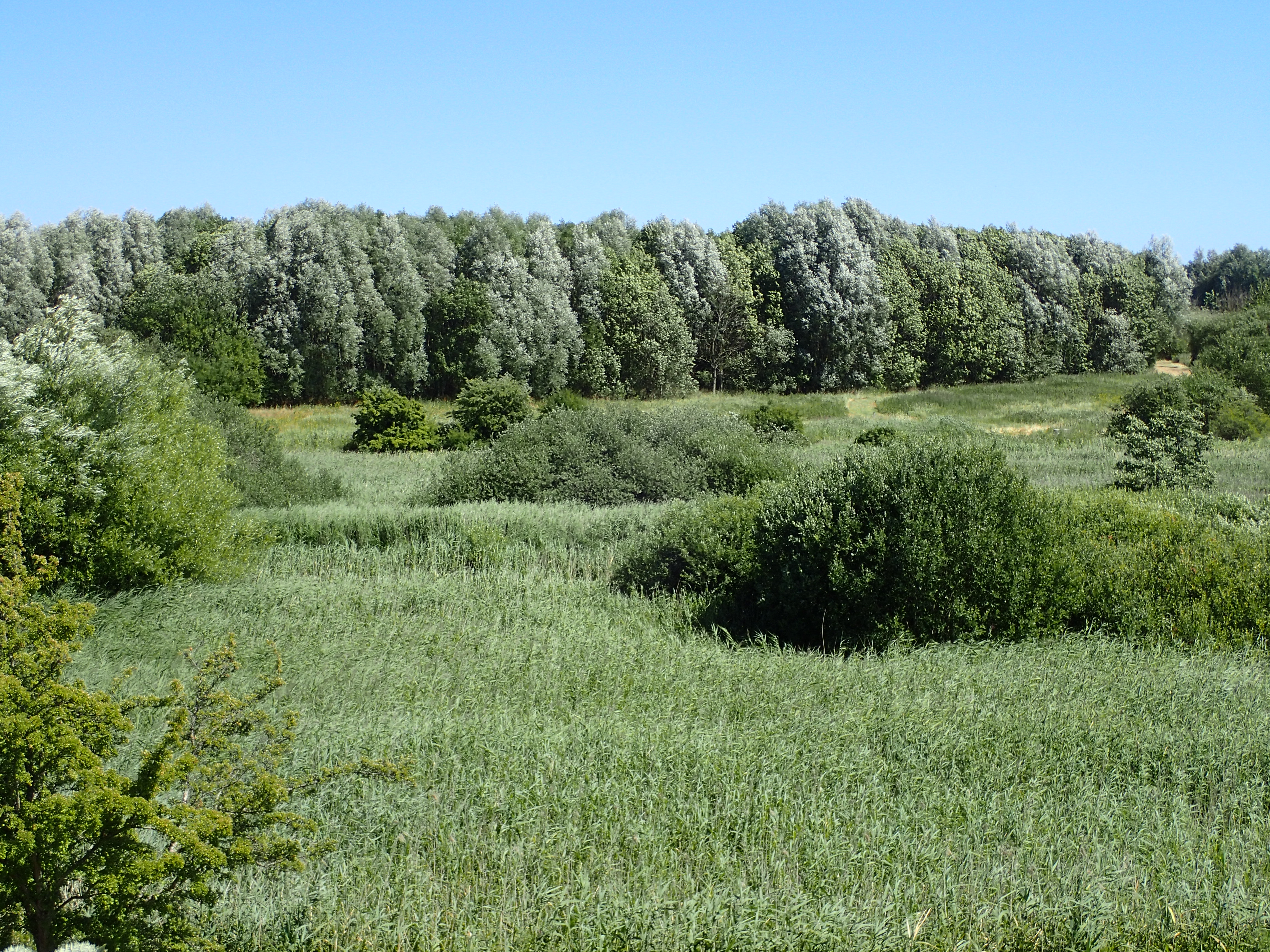 Aarhus Ådal ved Åby med udsyn mod Eskelund henover Aarhus Å (skjult i sivskoven).